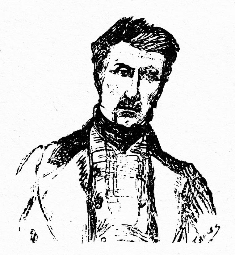 Hossard, par Charles Jouas. Vignette de couverture, tome VII de "Cent Ans aux Pyrénées", de Henri Beraldi.